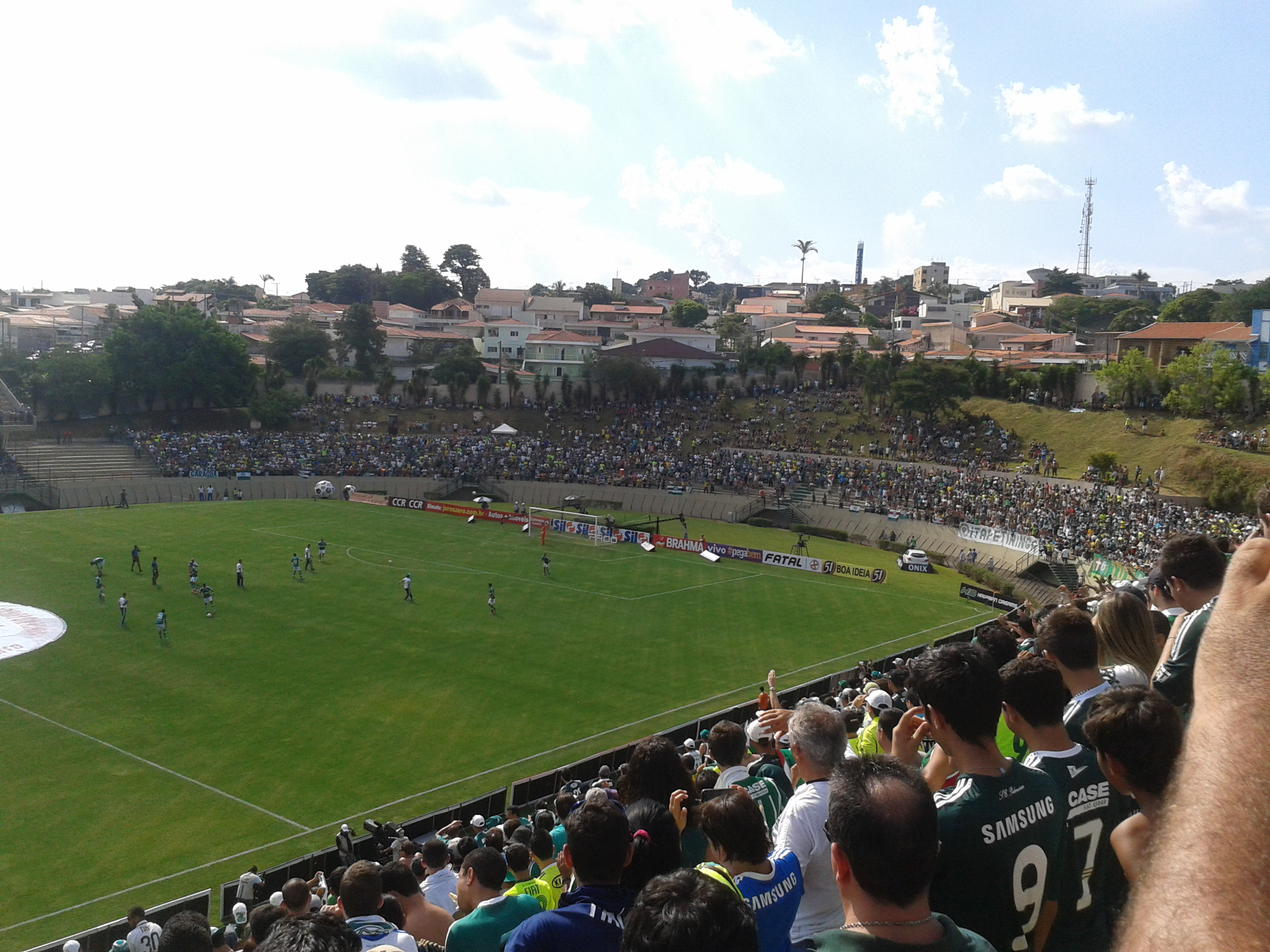 FICHA TÉCNICA ATLÉTICO SOROCABA 1 X 4 PALMEIRAS Local: Estádio Walter Ribeiro, em Sorocaba (SP) Data: 26 de janeiro de 2013, domingo Horário: 17 horas (de Brasília) Árbitro: Cássio Luiz Zancopé (SP) Público/Renda: 11.218 pagantes/ R$ 537.260,00 Gols: ATLÉTICO SOROCABA: Ewerthon, aos 13 minutos do primeiro tempo PALMEIRAS: Valdivia, aos 21 minutos do primeiro tempo; Leandro, aos 22, Juninho, aos 30, e Wesley, aos 47 minutos do segundo tempo